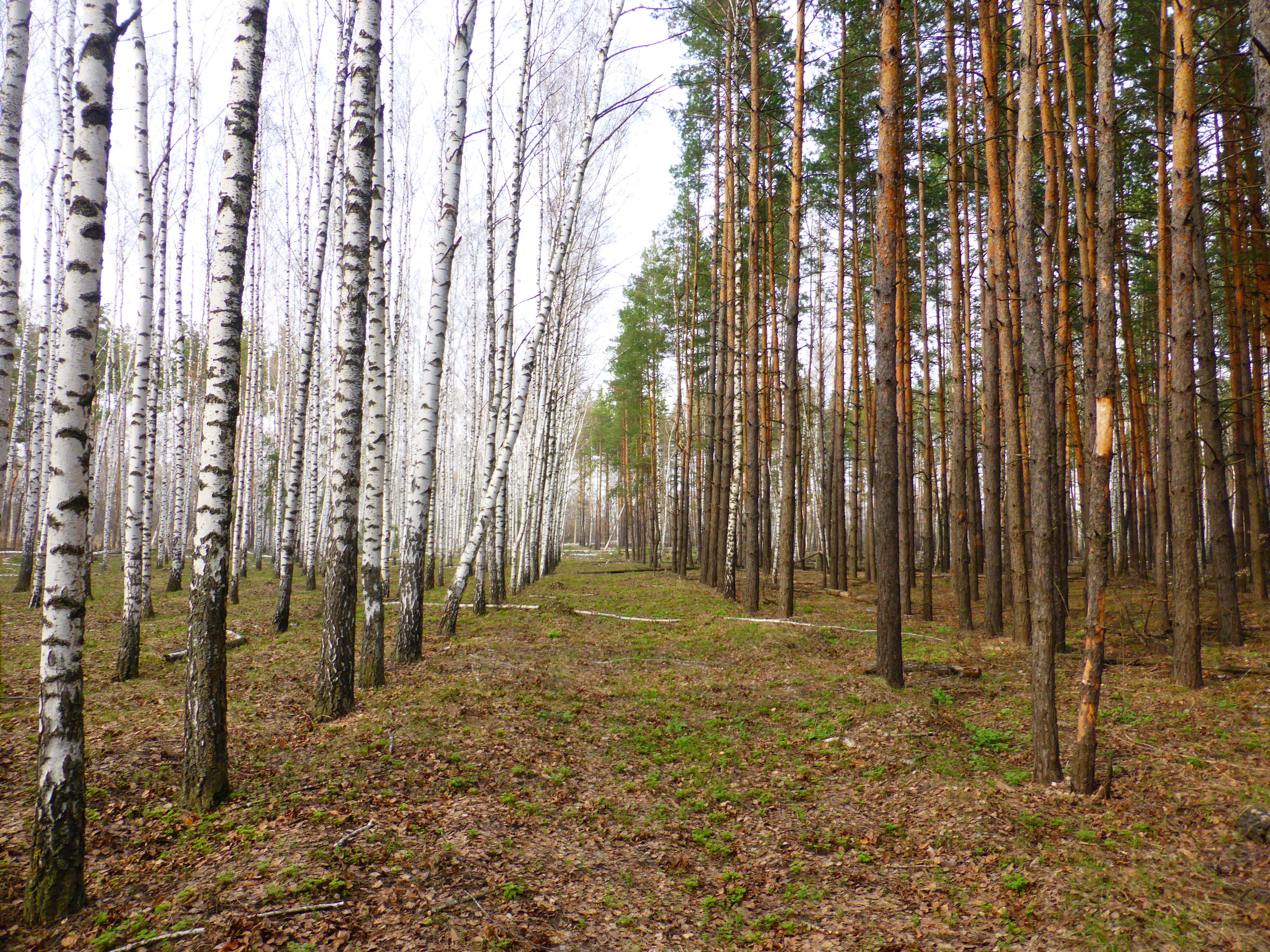 Плантация кедро-сосны: Воронеж, Воронежская область This image is related to the protected area of Russia number 3610084